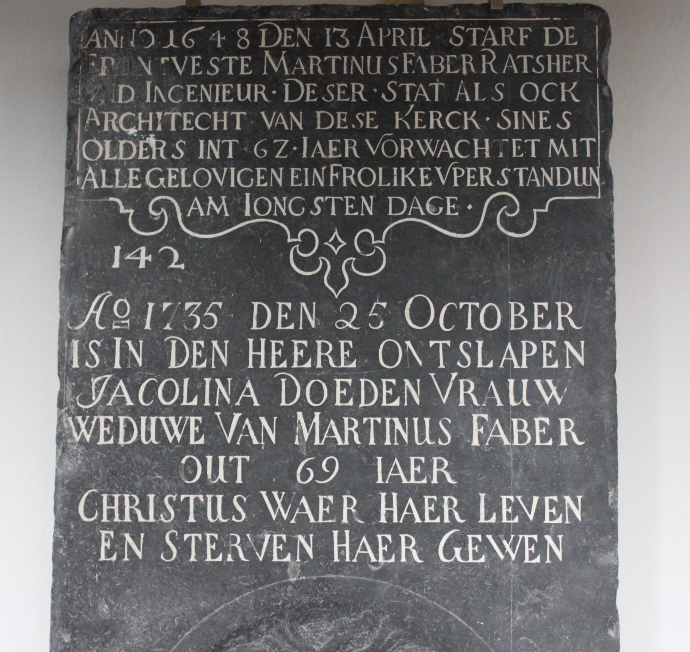 Neue Kirche in Emden, Ostfriesland, Niedersachsen, Deutschland